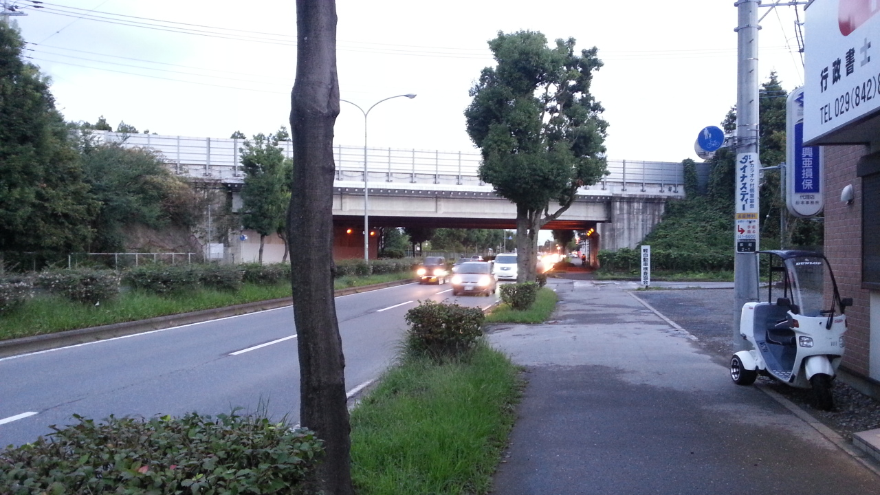 土浦市卸町